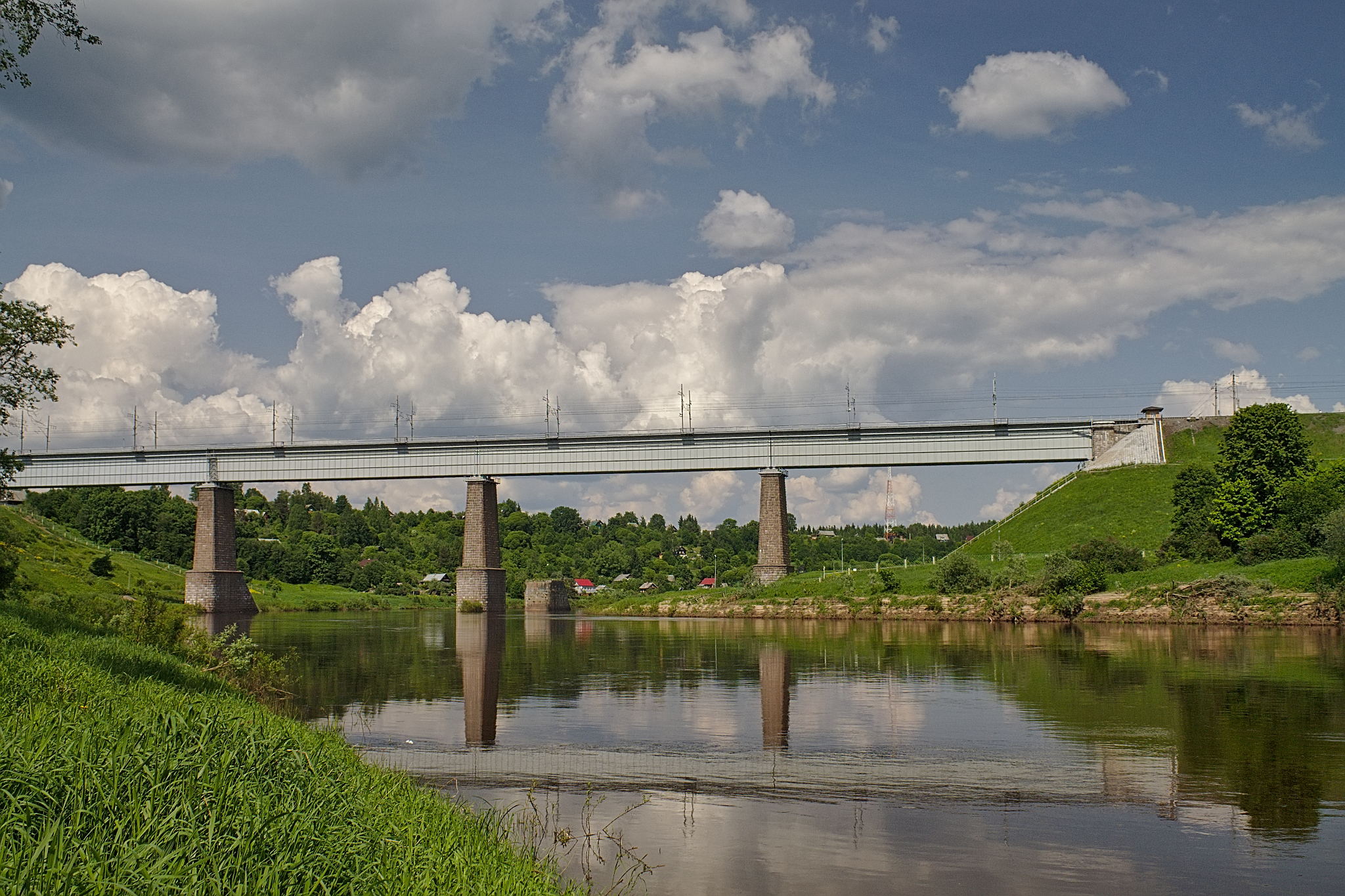 Река Мста и деревня Мстинский Мост, Новгородская область. см. фото 507503 в альбоме автора